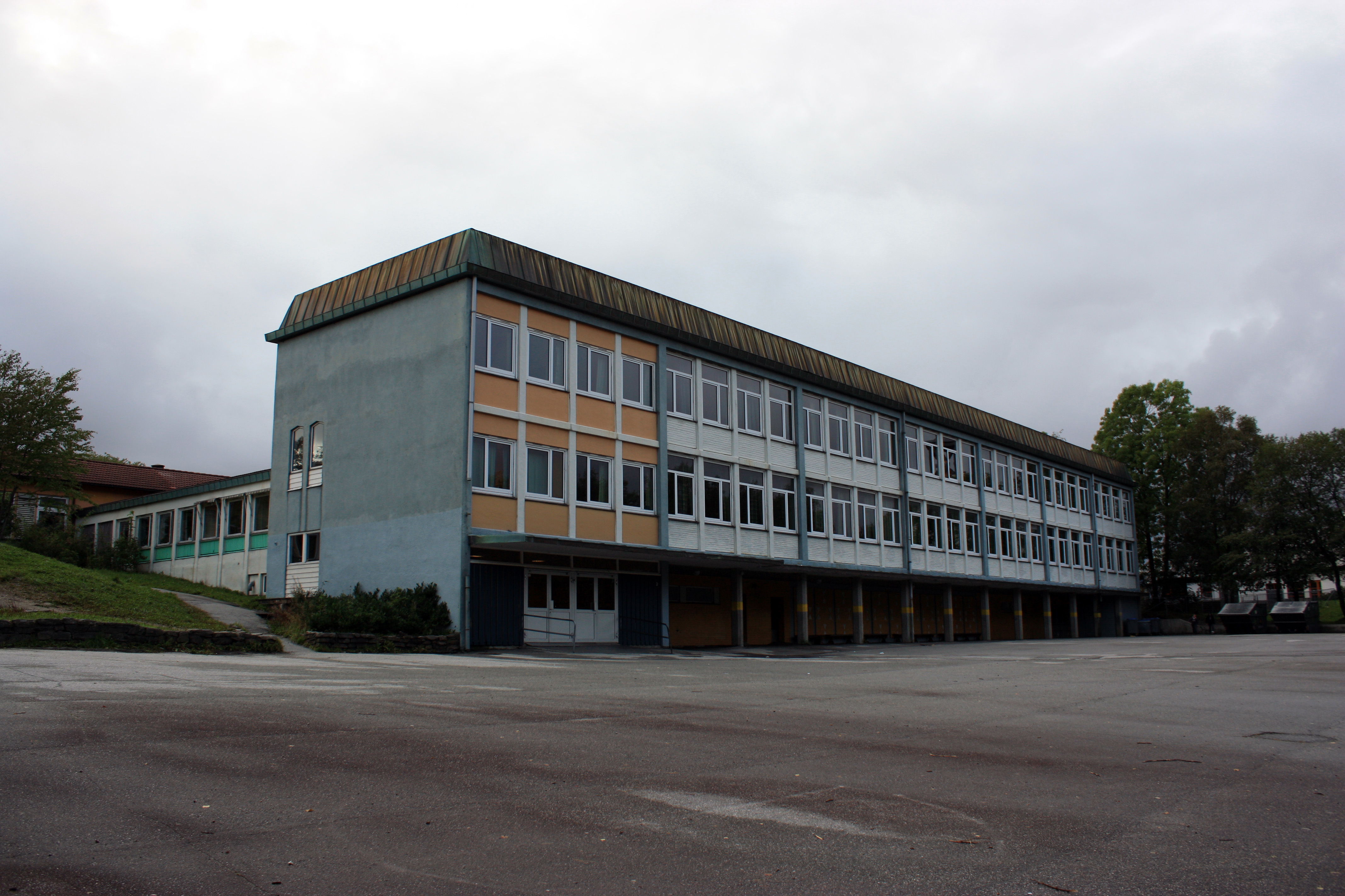 Skjold skole, Fana, Bergen.